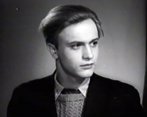 Балашов, Владимир Павлович в роли Бертольда Оппенгейма, кадр из фильма «Семья Оппенгейм»